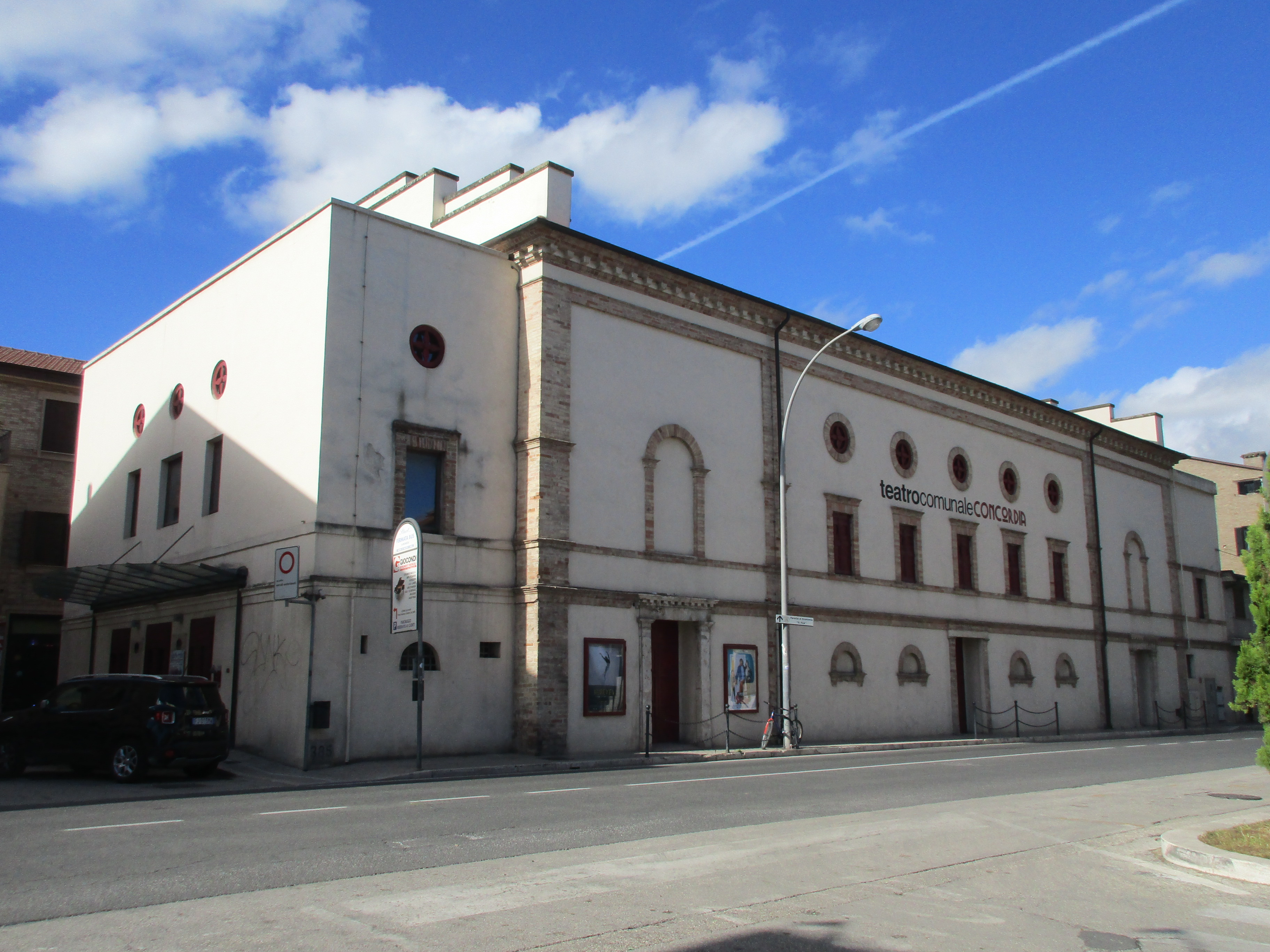 San Benedetto del Tronto - Teatro Concordia